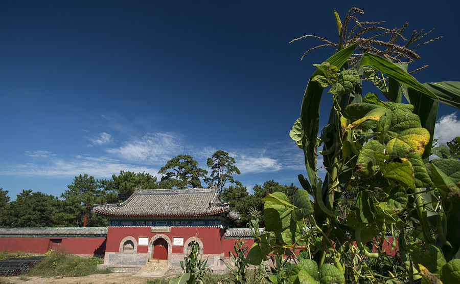 中文（中国大陆）: 溥仁寺的山门